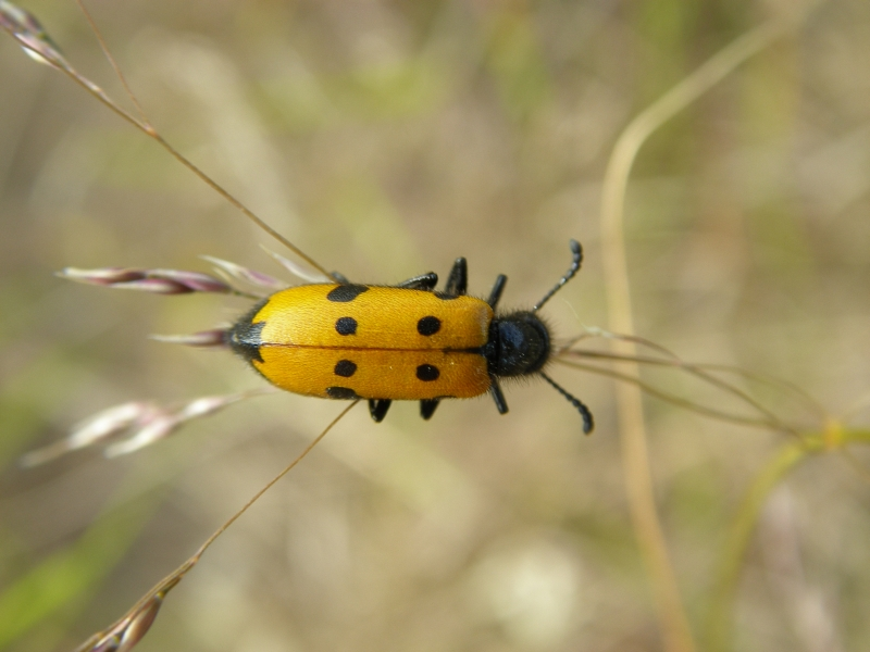 Insecto / Bug (Mylabris quadripunctata)